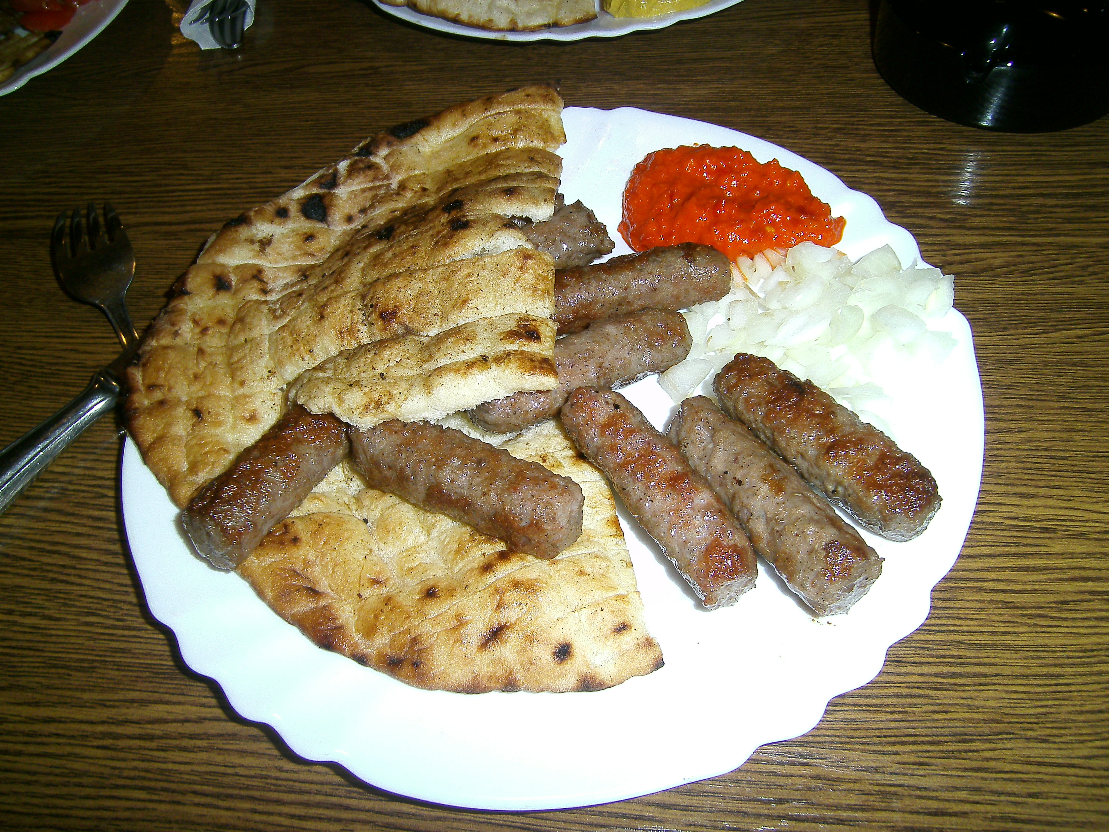 Cevapcici Bosnia